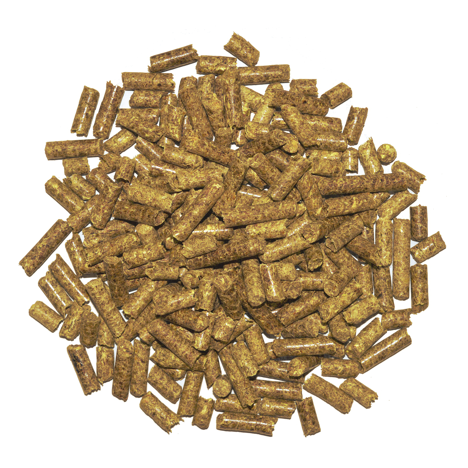 Foto Strohpellets